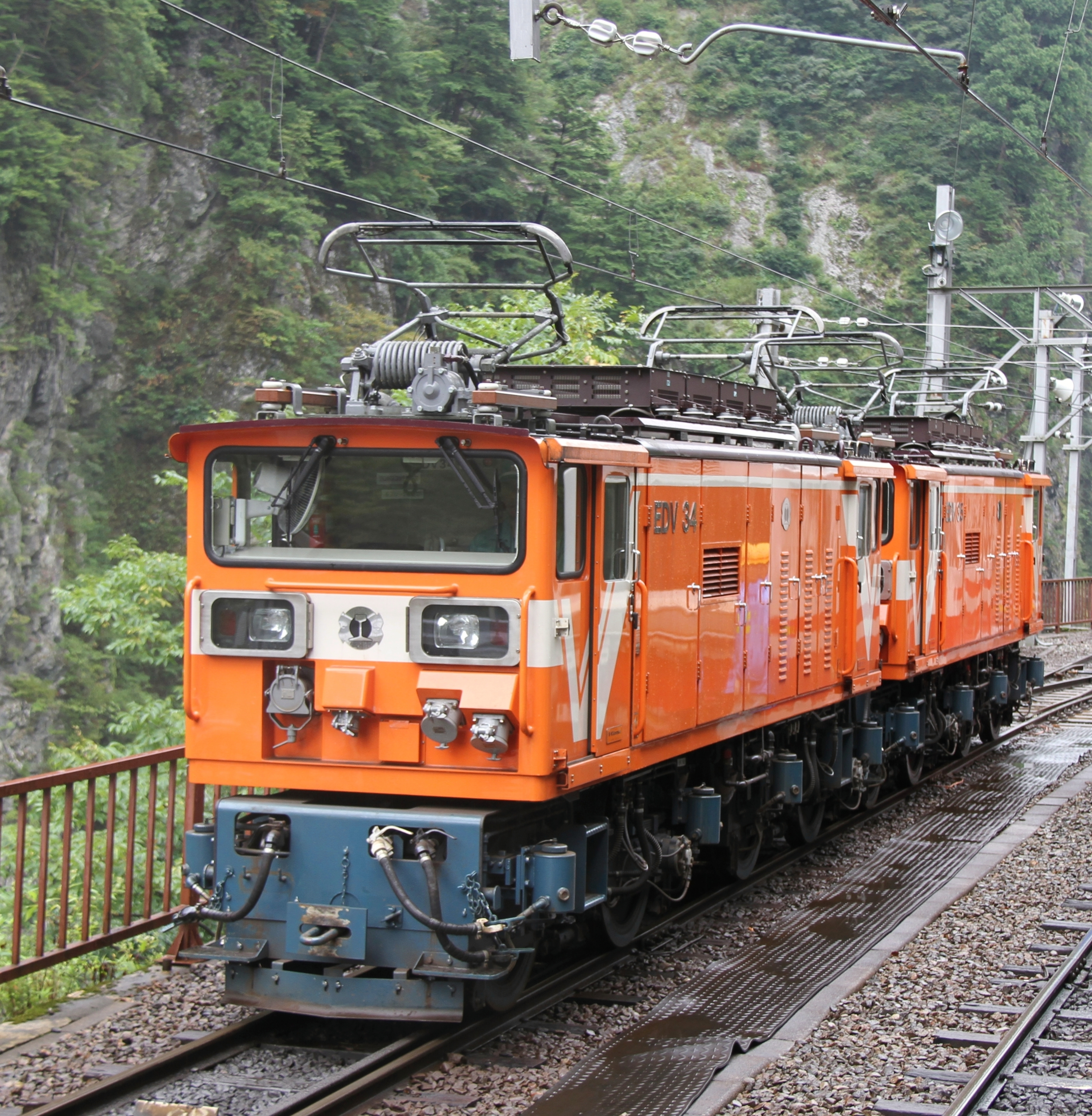 黒部峡谷鉄道EDV34/EDV35